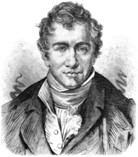 Humphry Davy